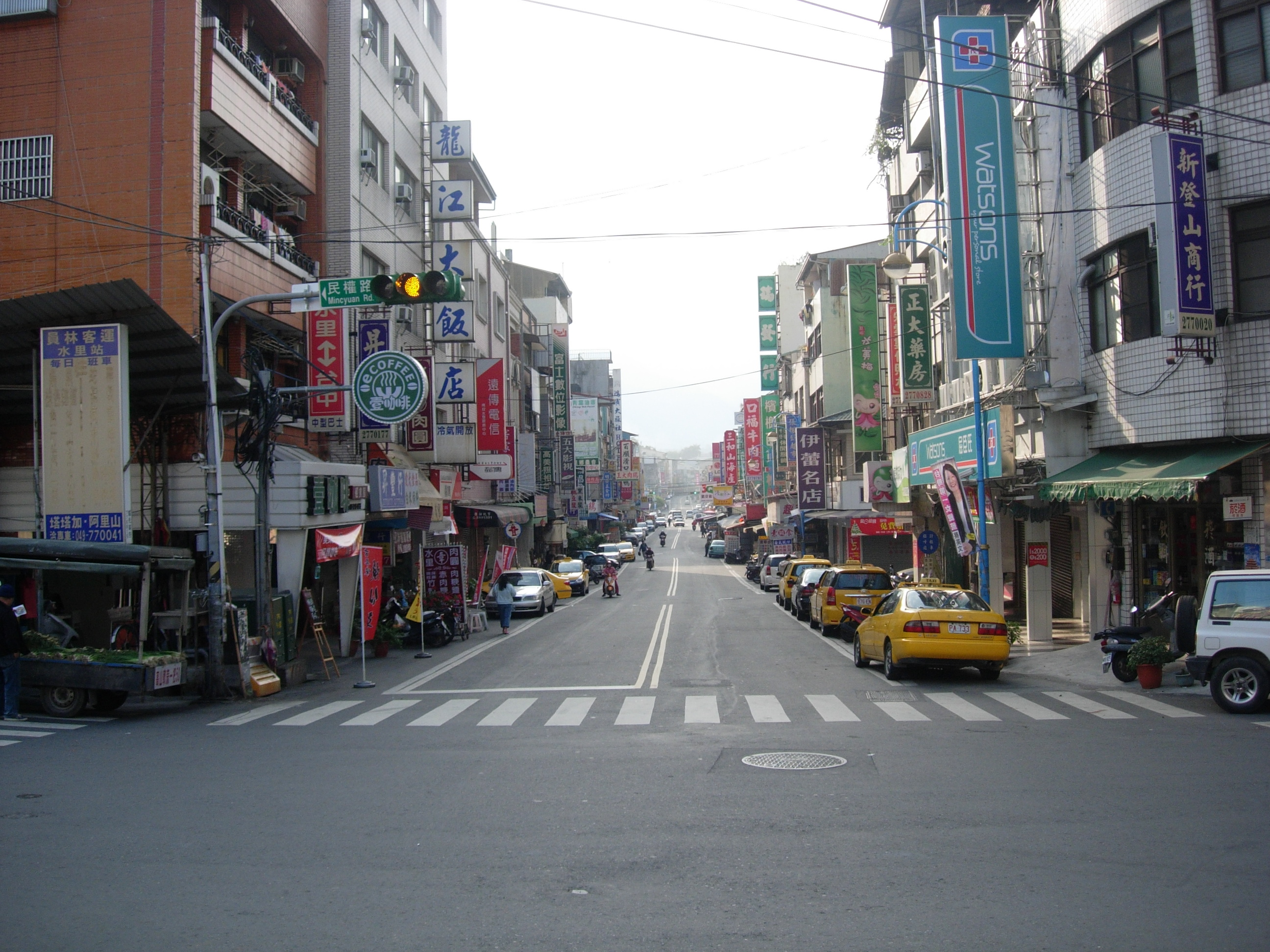 中文（台灣）: 水里市區一景